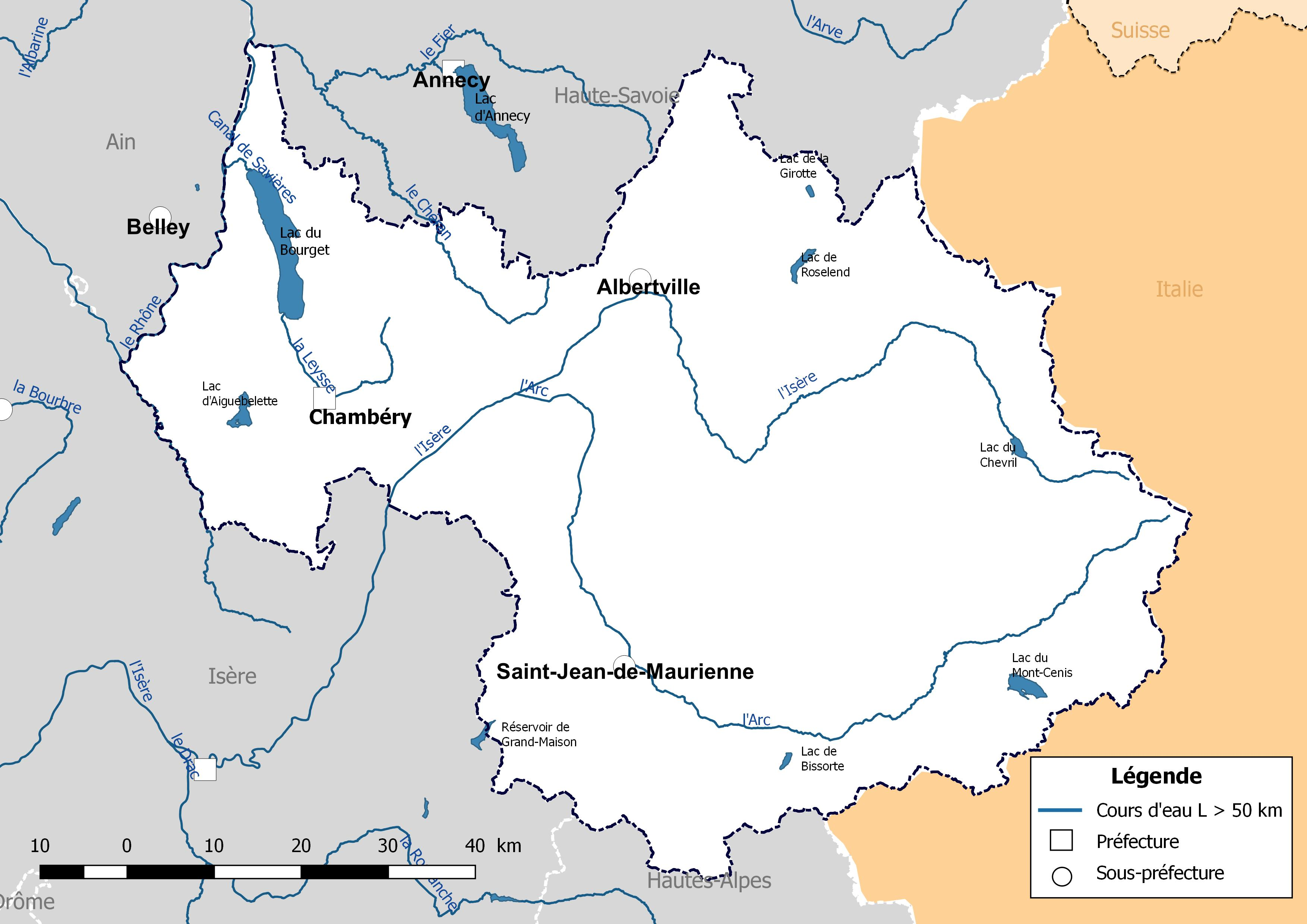 Carte des cours d'eau de longueur supérieure à 50 km drainant le département de la Savoie (France).